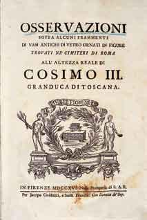 Filippo BUONARROTI, 1661-1733. Osservazioni sopra alcuni frammenti di vasi antichi di vetro ornati di figure trovati ne' cimiteri di Roma... In Firenze: nella stamperia di S.A.R. per Jacopo Guiducci, e Santi Franchi, MDCCXVI [1716].